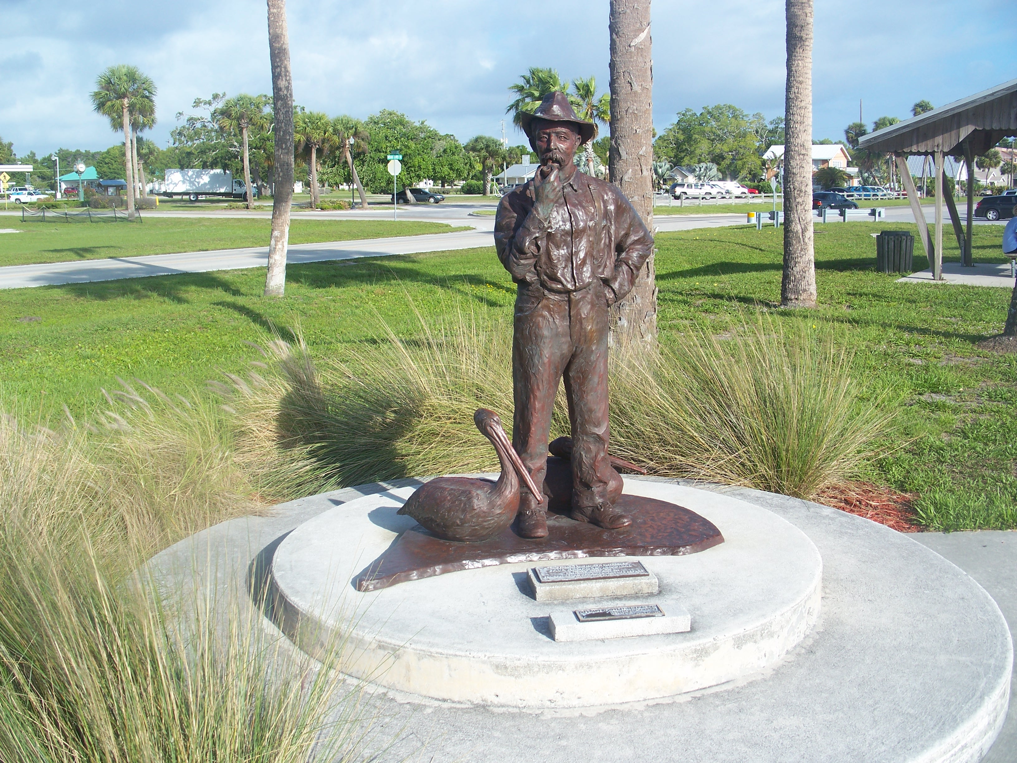 Sebastian, Florida: Paul Kroegel memorial